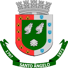 Brasão do município brasileiro de Santo Ângelo, Rio Grande do Sul.